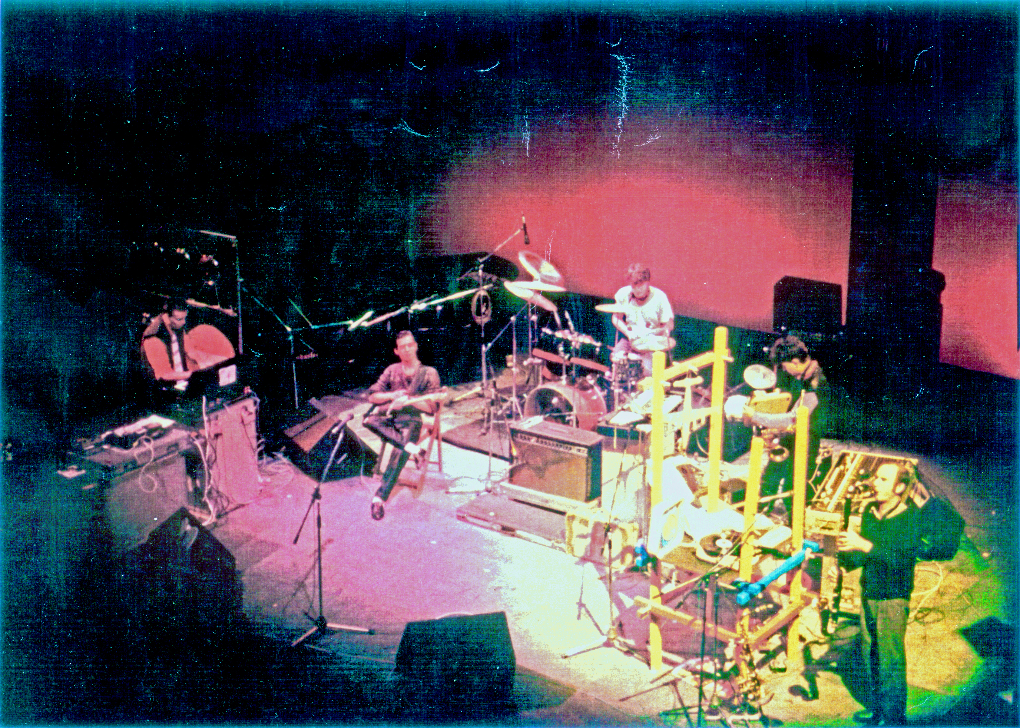 Clónicos live at the International Jazz Festival madrid 1985